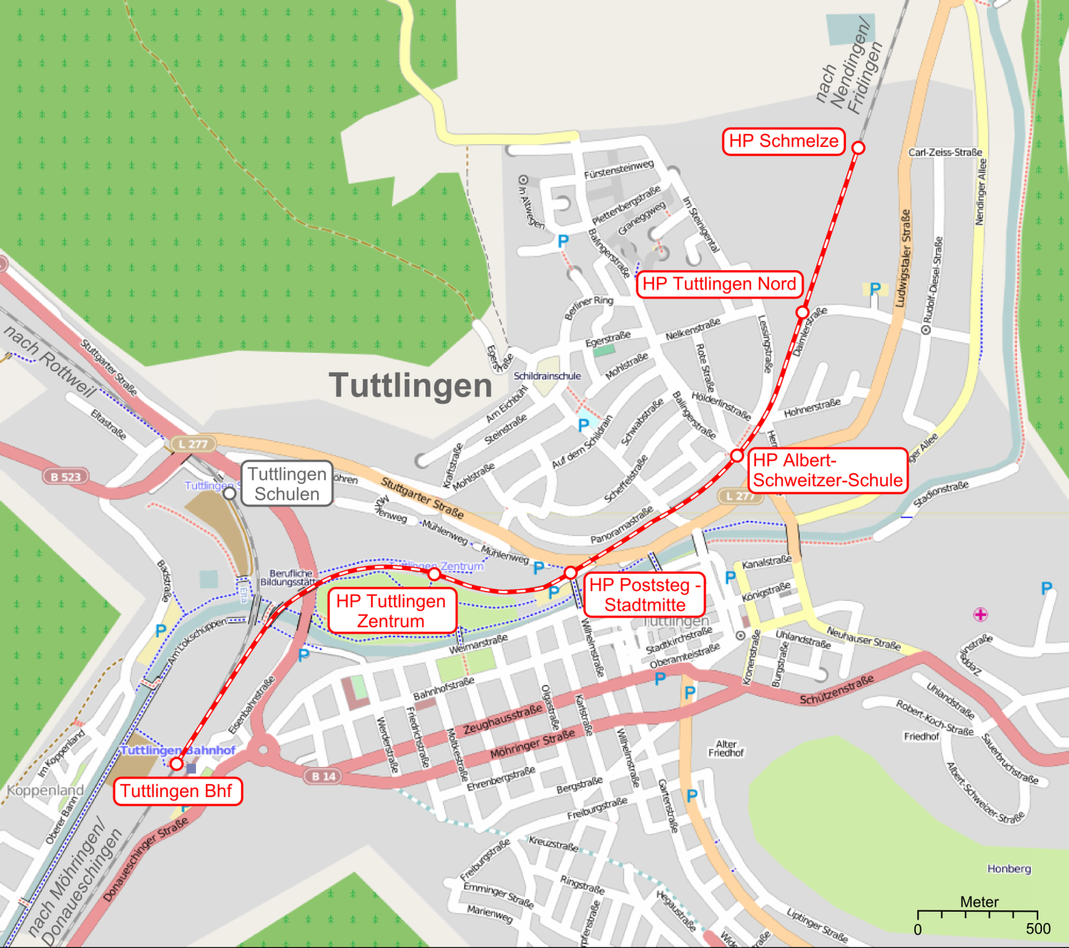 Karte des möglichen Verlaufs der Tuttlinger Stadtbahn